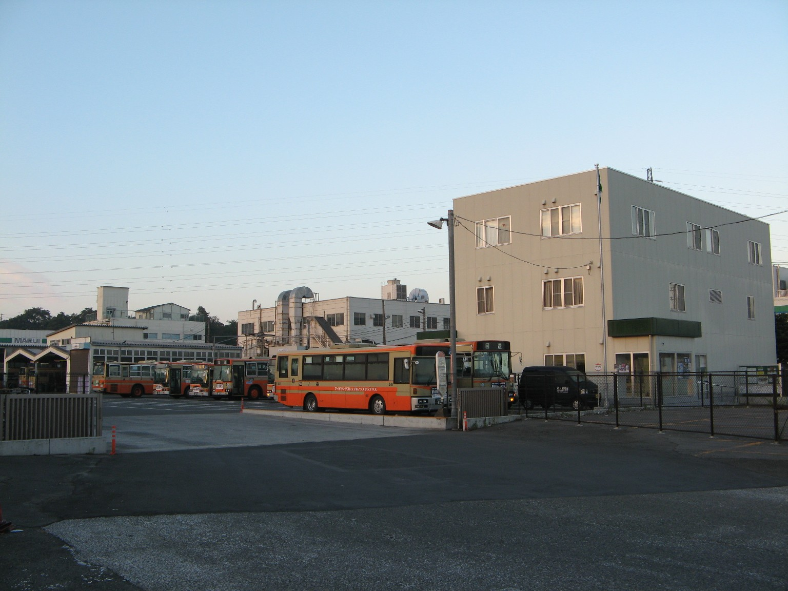 江ノ島電鉄自動車部鎌倉営業所